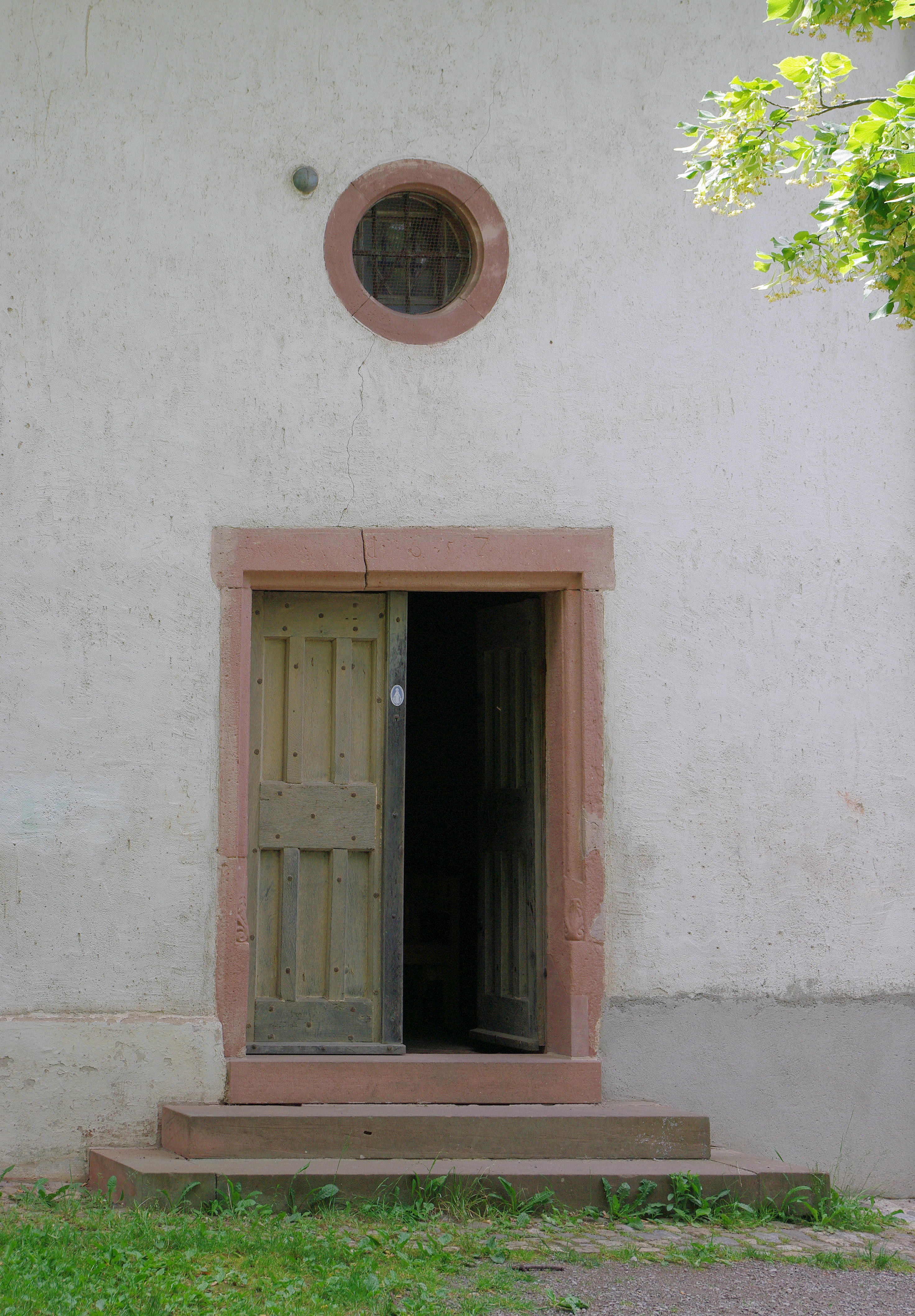 Der Haupteingang de Marienkapelle mit der Kanonenkugel von 1744 links neben dem runden Fenster